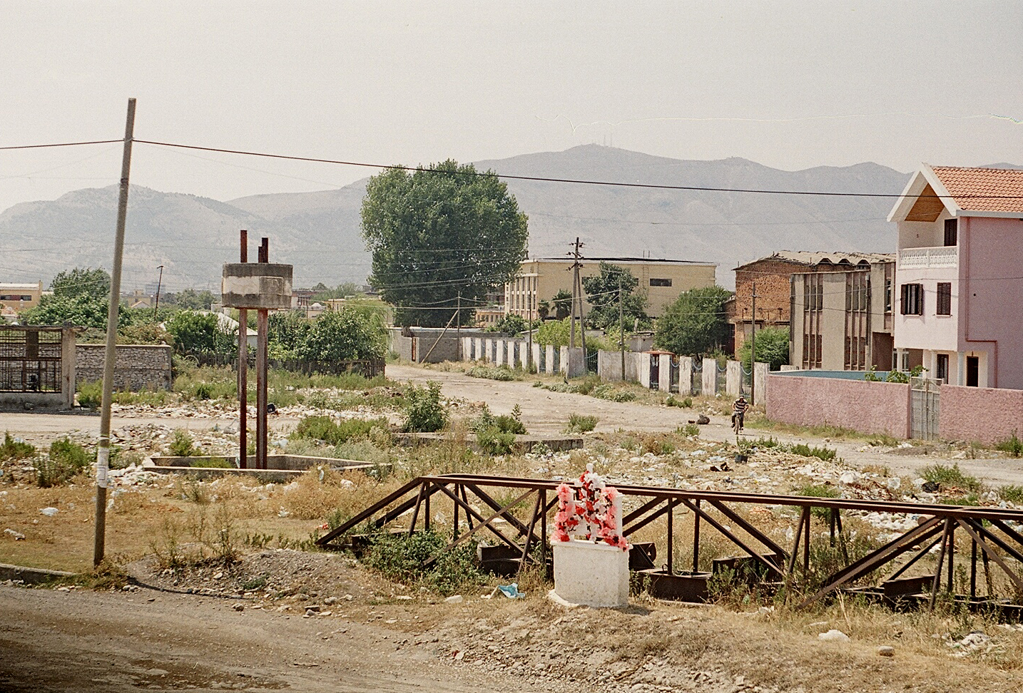 Shkoder (Albania), Summer 2003